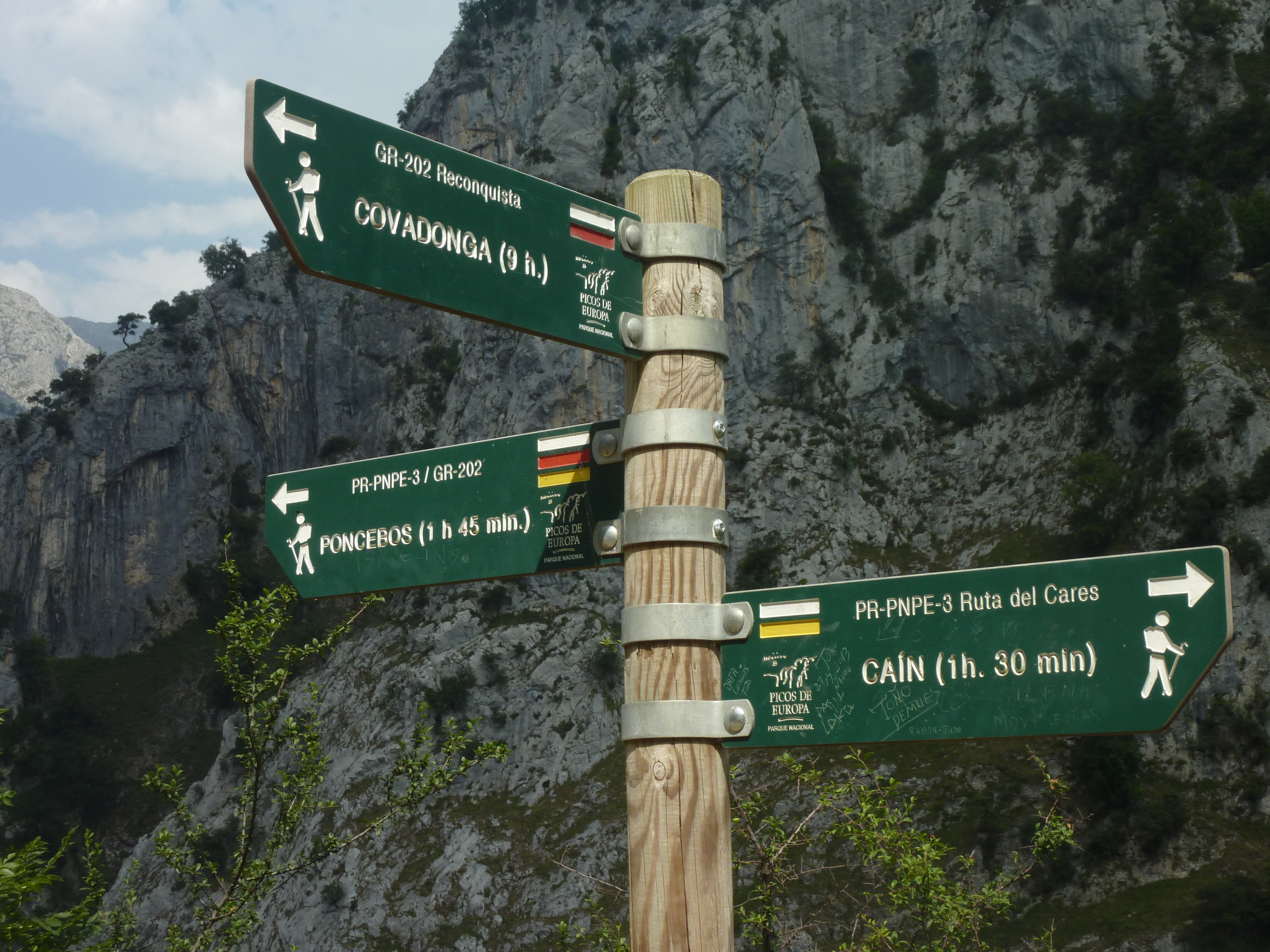 Panneaux de balisage PR/GE du sentier du Cares. Pics d'Europe, Asturies, Espagne